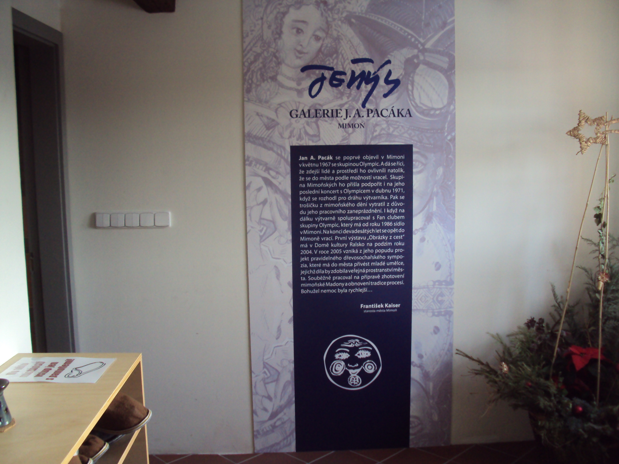 Z galerie Pacáka v městském muzeu Mimoň